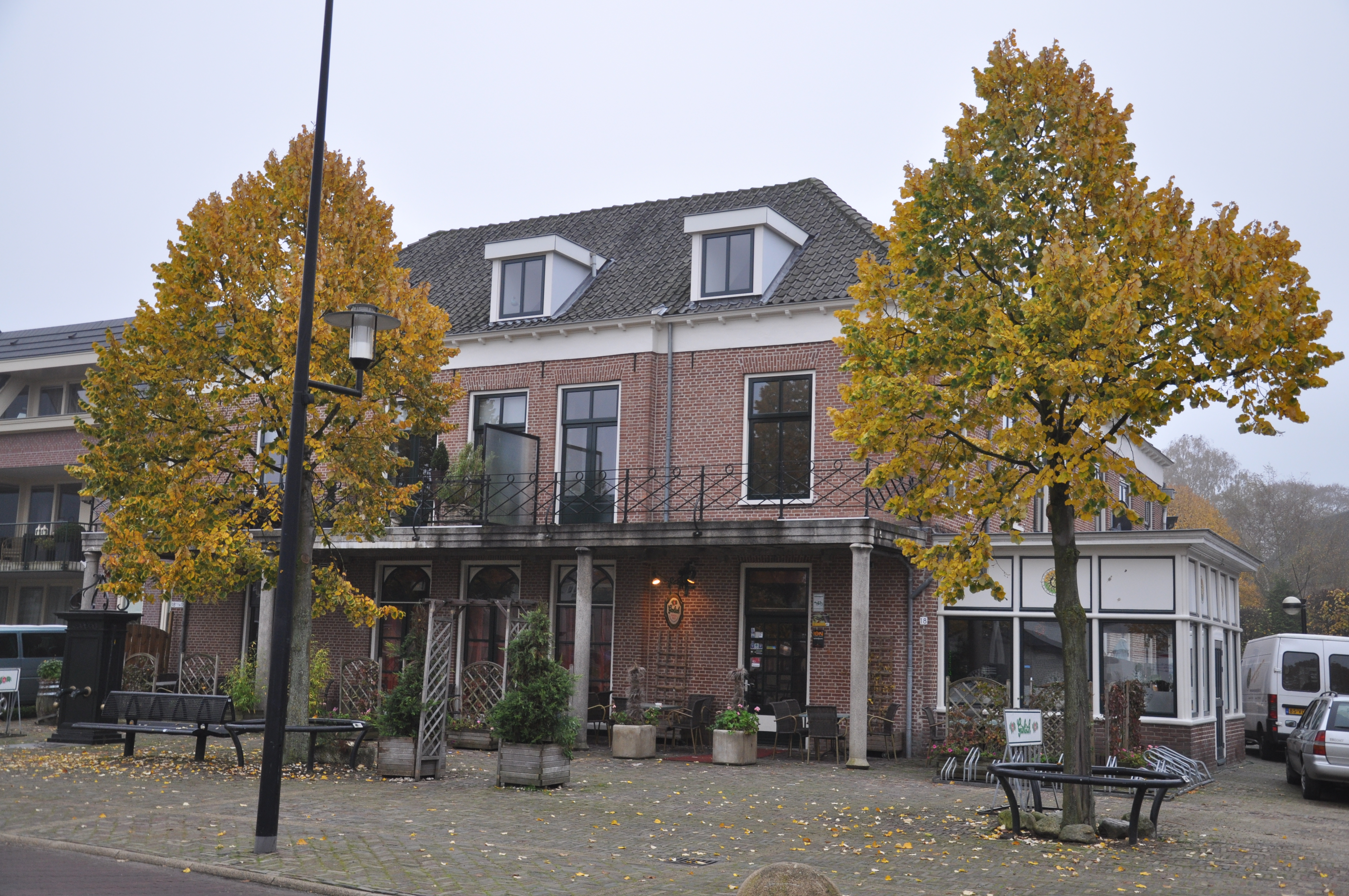 Marktplein 18Unknown brummen, market square 18